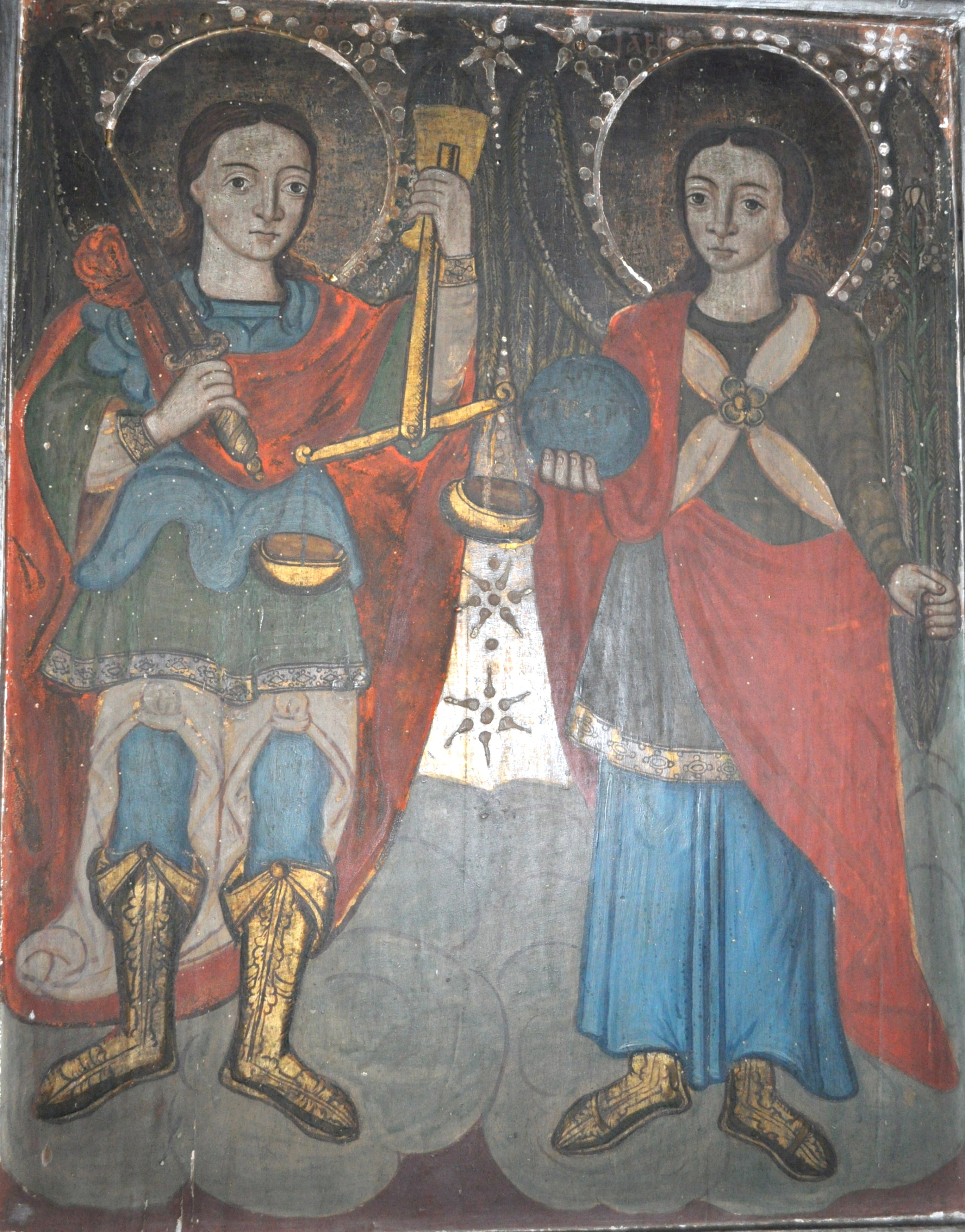 Biserica de lemn din Roșia Nouă, județul Arad